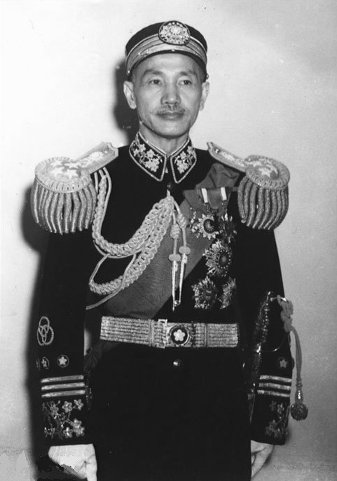 蒋介石